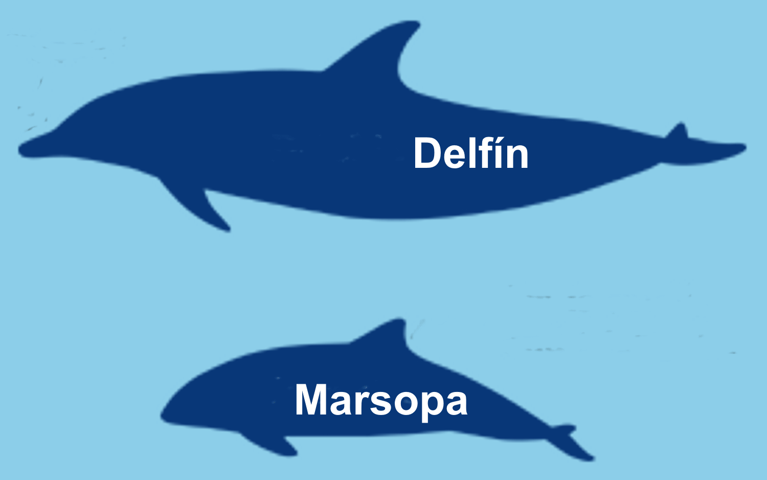 Diferencias esquematicas entre delfines y marsopas Delfin = Delphinidae Marsopa = Phocoenidae